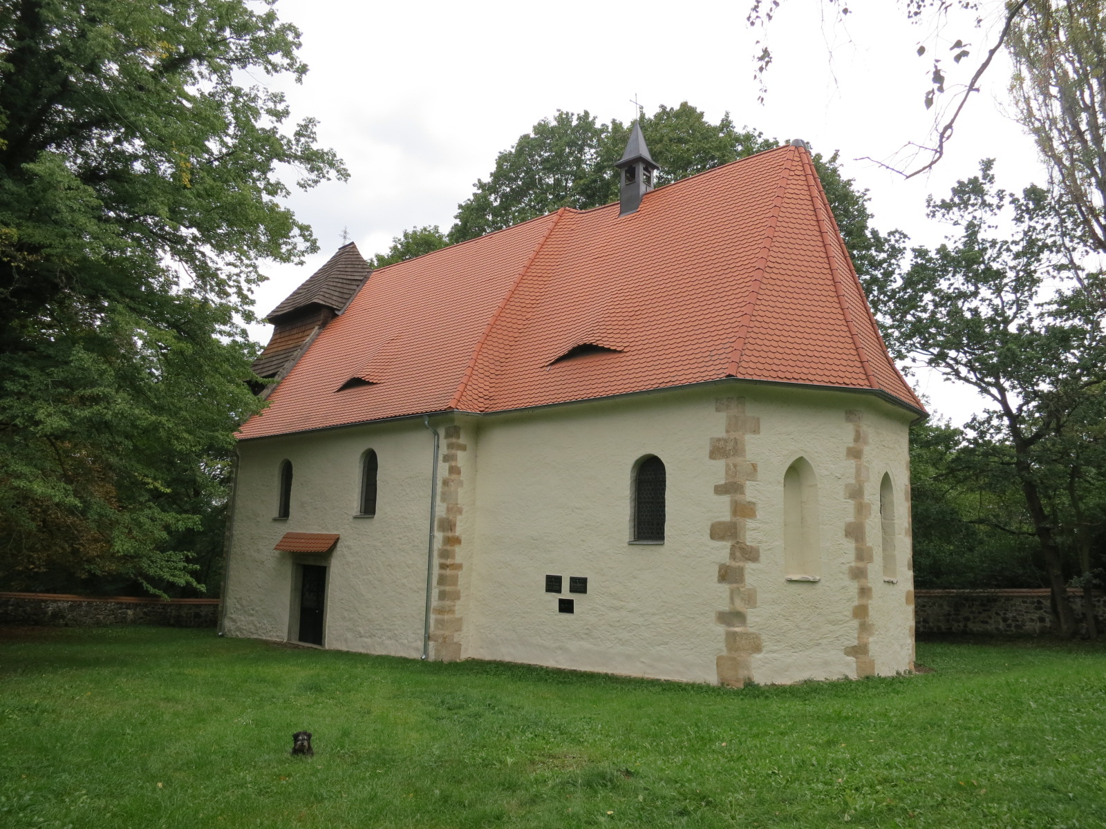 Pohled na závěr kostela sv. Ambrože ve Vícově This image was acquired during the event Wikiměsto Přeštice 2019.